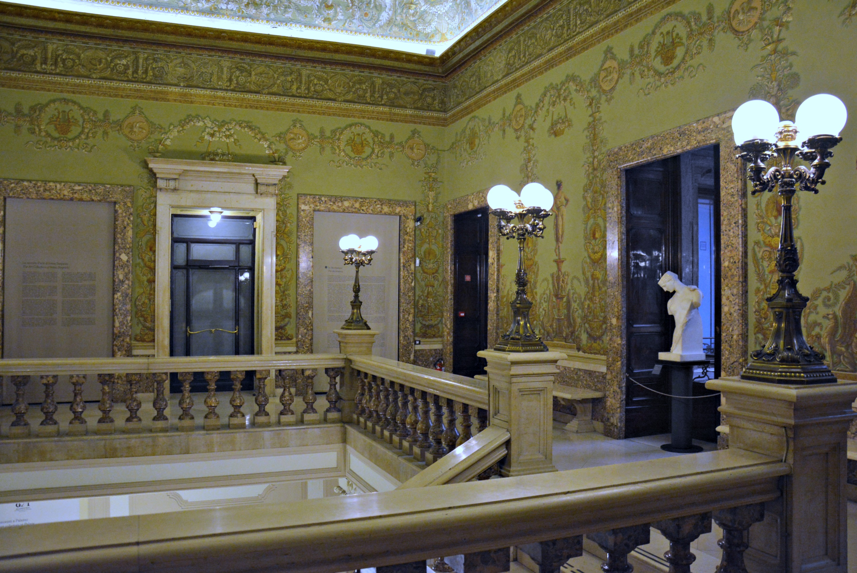 Palazzo Zevallos a Napoli